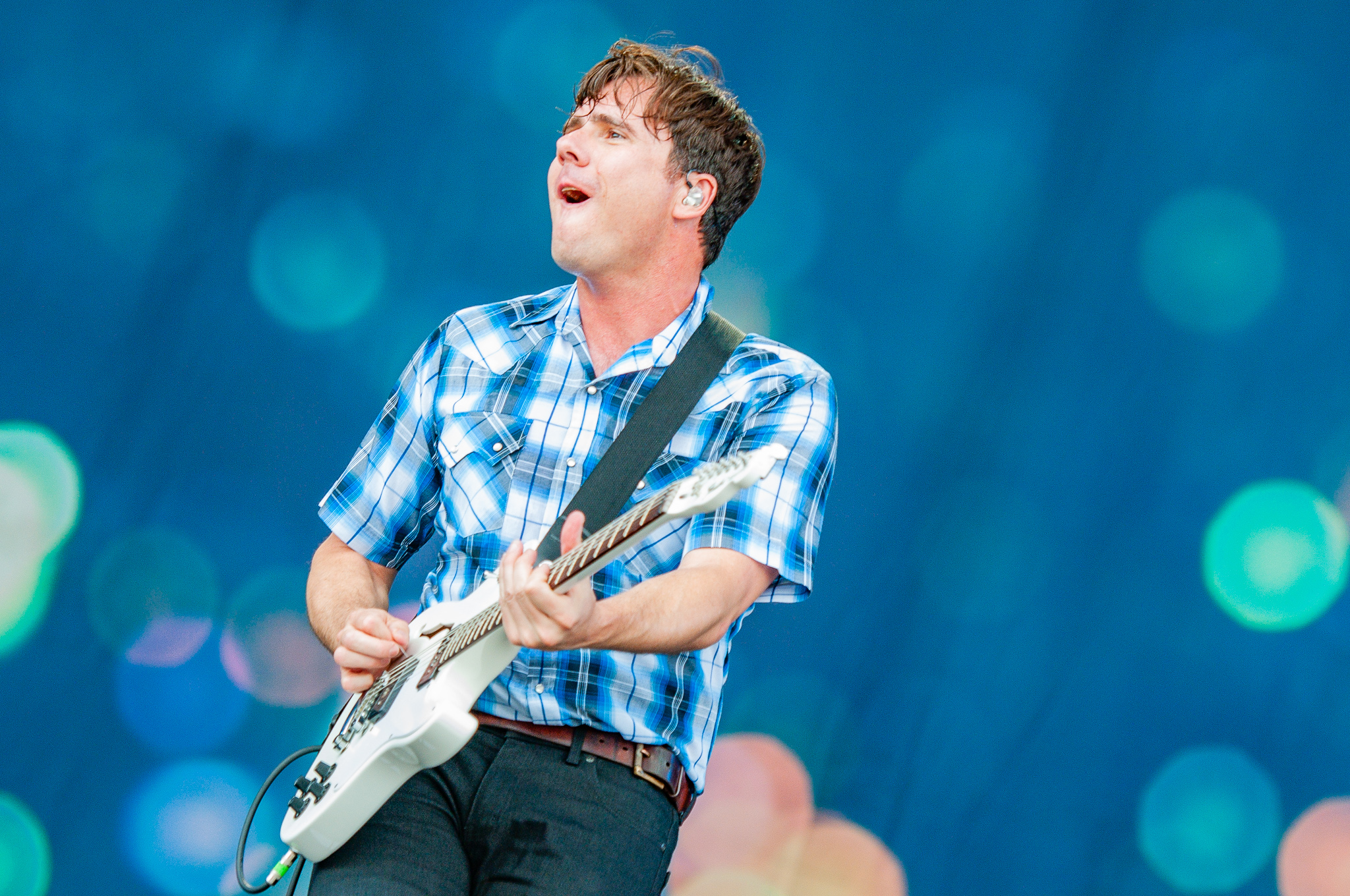 ARGO-Konzerte,Festival,James Christopher Adkins,Jim Adkins,Jimmy Eat World,Konzert,Livekonzert,Livemusik,Musik,RiP,Rock im Park 2018,Zeppelin Stage